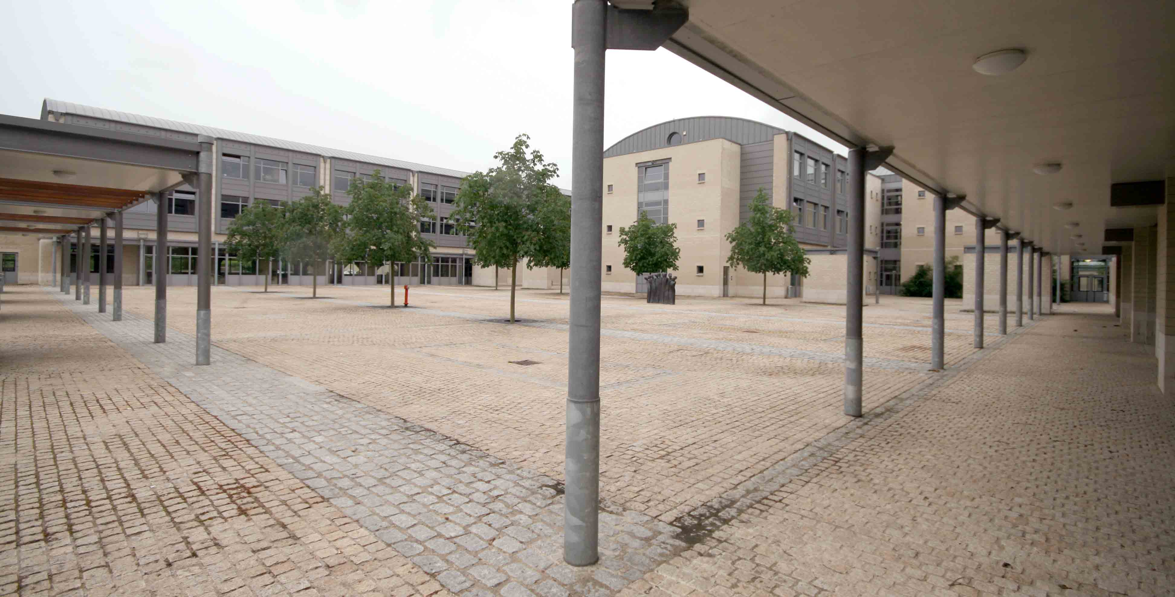 Lycée Barthel Bannenhaff.